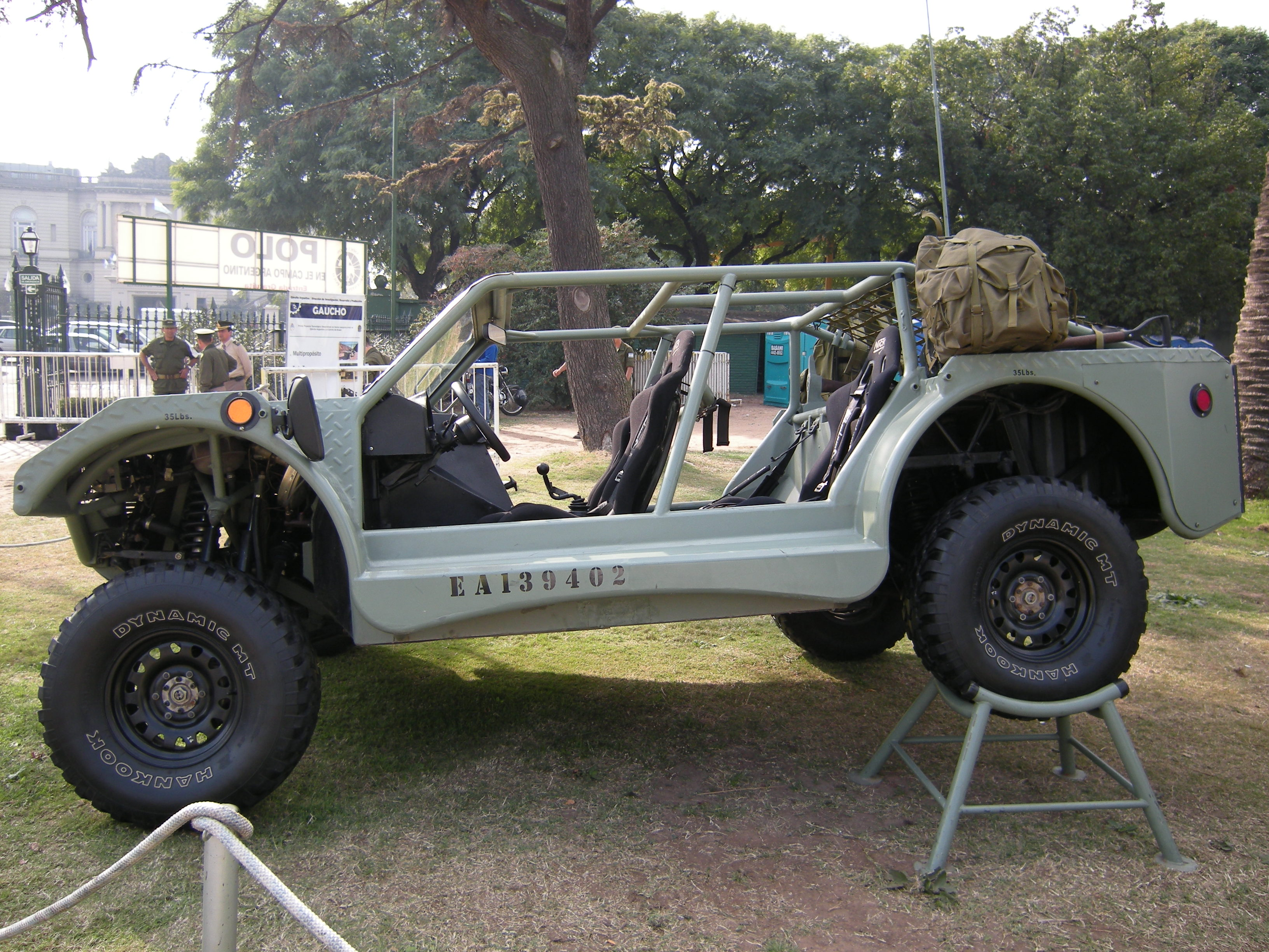 Vehículo Ligero de Empleo General Aerotransportable "Gaucho", durante la Exposición del Ejército Argentino realizada en mayo de 2008